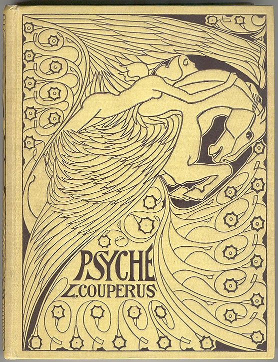 Dit is een boekband van het boek Psyche van Louis Couperus, ontworpen door Jan Toorop (overleden 1928)